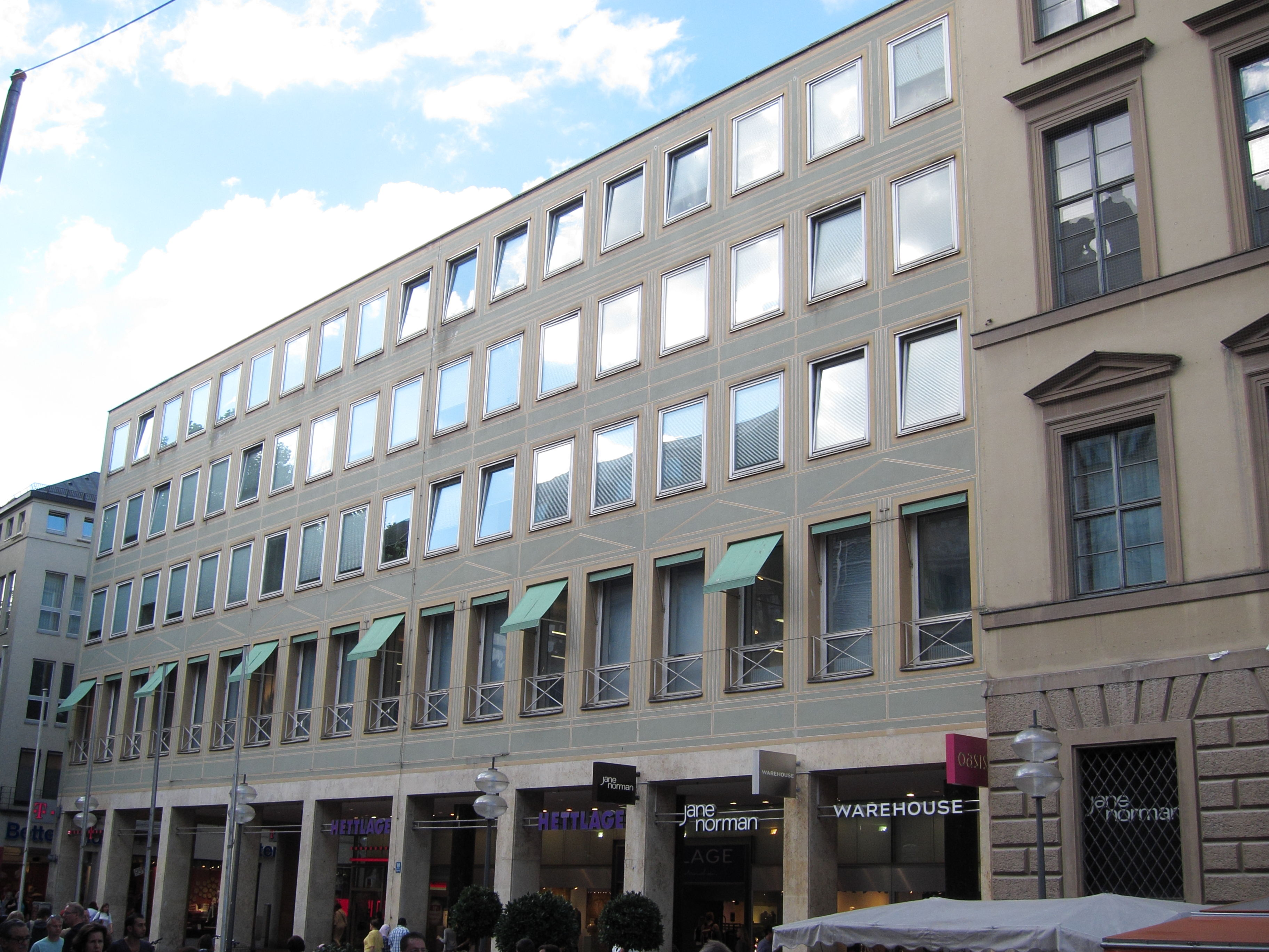 Neuhauser Straße 10; Kaufhaus Hettlage, schlichter, fünfgeschossiger Stahlbetonskelettbau mit weiträumiger Erdgeschossarkade, anstelle des kriegszerstörten Westflügels der sog. Alten Akademie (vgl. Neuhauser Straße 8) 1953-55 von Josef Wiedemann errichtet; Baukubus mit verputzter Lochfassade, deren lineare Fassadenbemalung durch Hermann Kaspar mit dem historischen Giebelbau der Alten Akademie korrespondiert; Fußgängerarkade mit der Erdgeschosshalle dieses Giebelbaus verbunden. This is a photograph of an architectural monument.